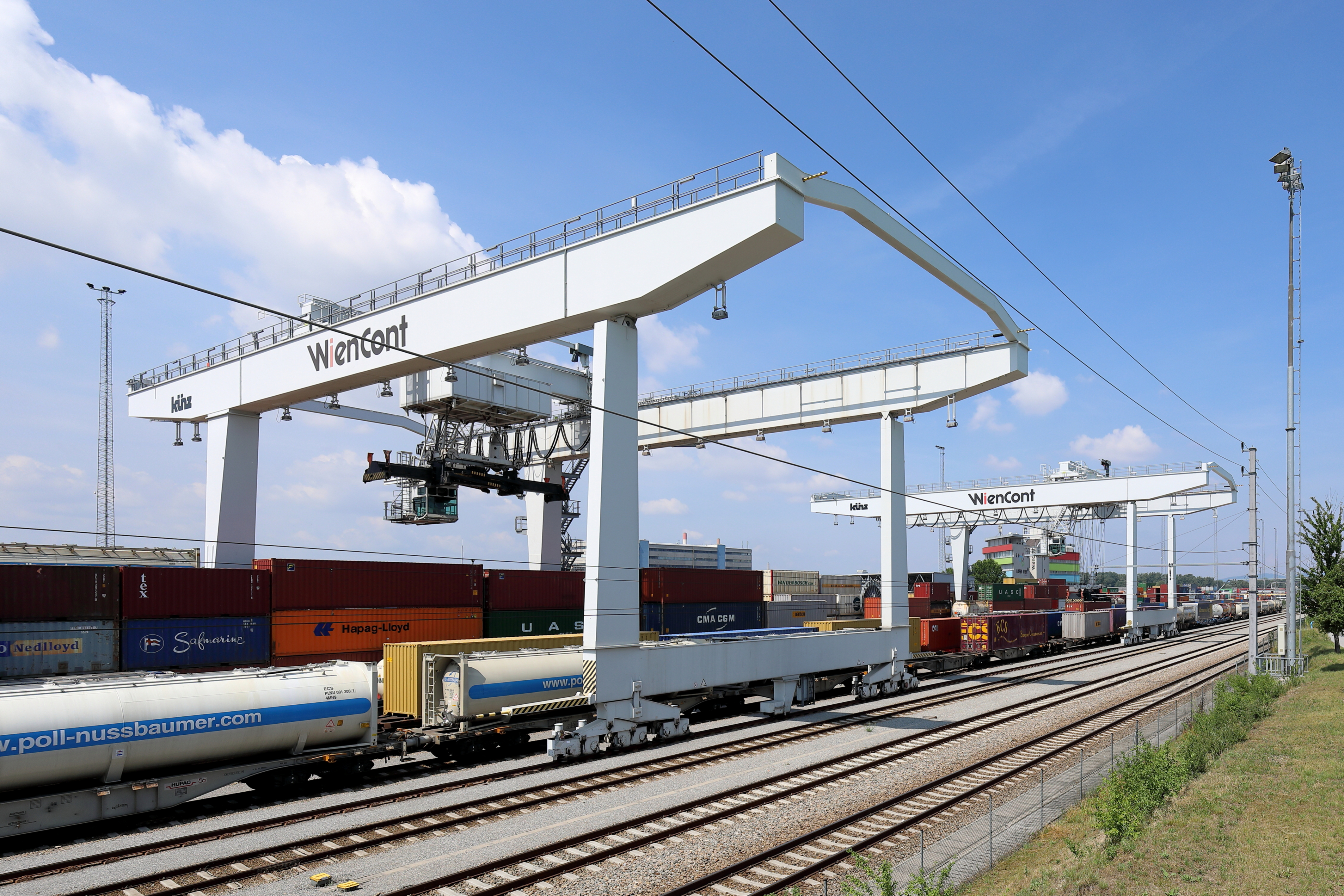 Das Containerterminal des Hafens Freudenau im 2. Wiener Bezirk Leopoldstadt.Die Eröffnung des neuen Containerterminals erfolgte im September 2008. Zuerst mit zwei Portalkränen und 2013 wurde das Terminal mit einem dritten aufgerüstet. Diese je über 300 t schweren Portalkräne können sich auf einer Gleislänge von 730 m bewegen, haben eine Kranspurweite von 32,7 m und eine Haupthub-Tragfähigkeit von 45 t.